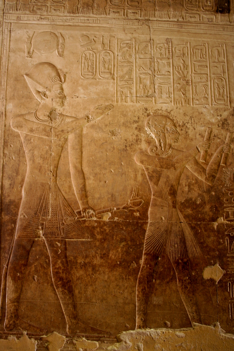 Temple d'Abydos, Séthi Ier et son héritier Ramsès, devant la Liste des Rois